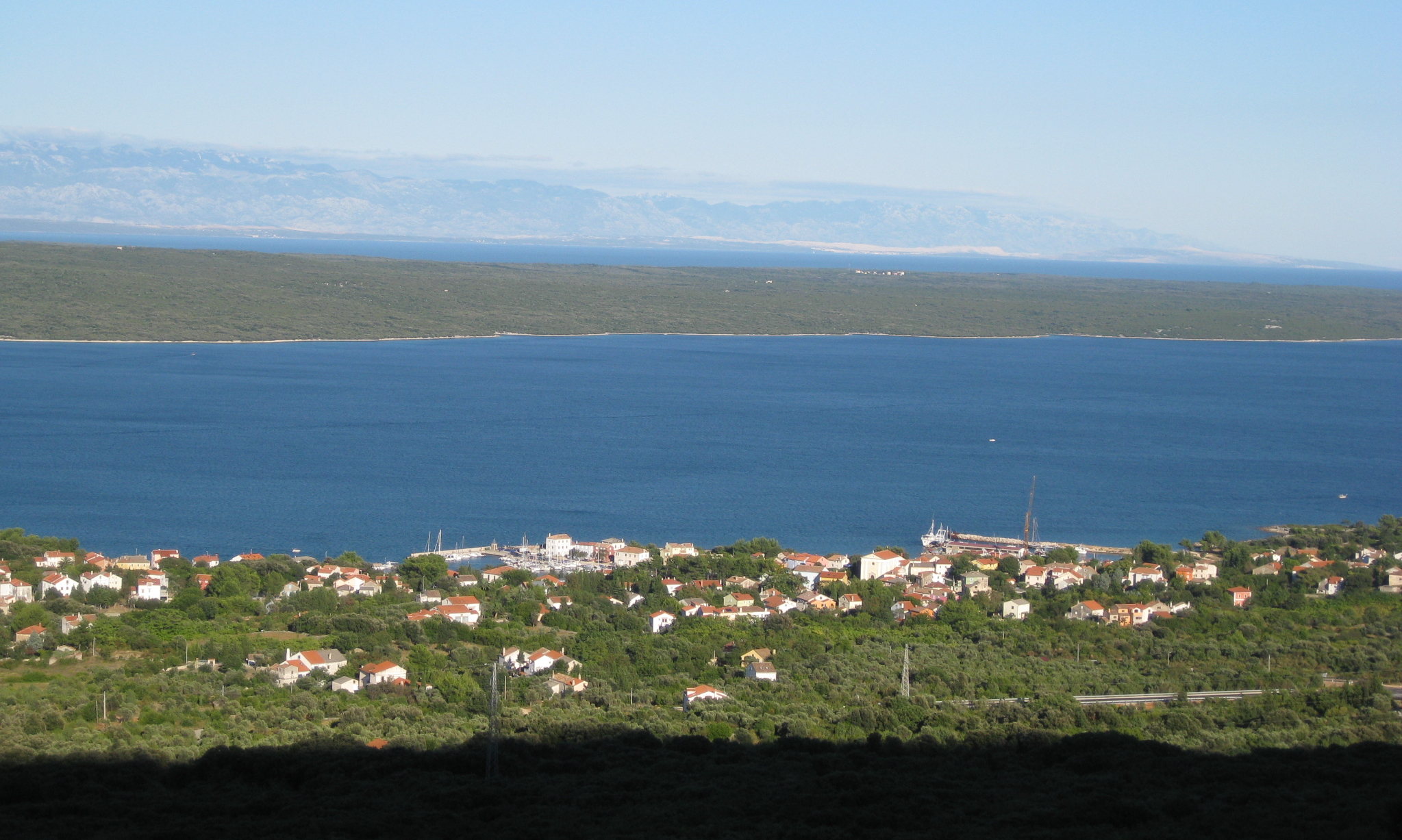 Nerezine, village on croatian island Lošinj